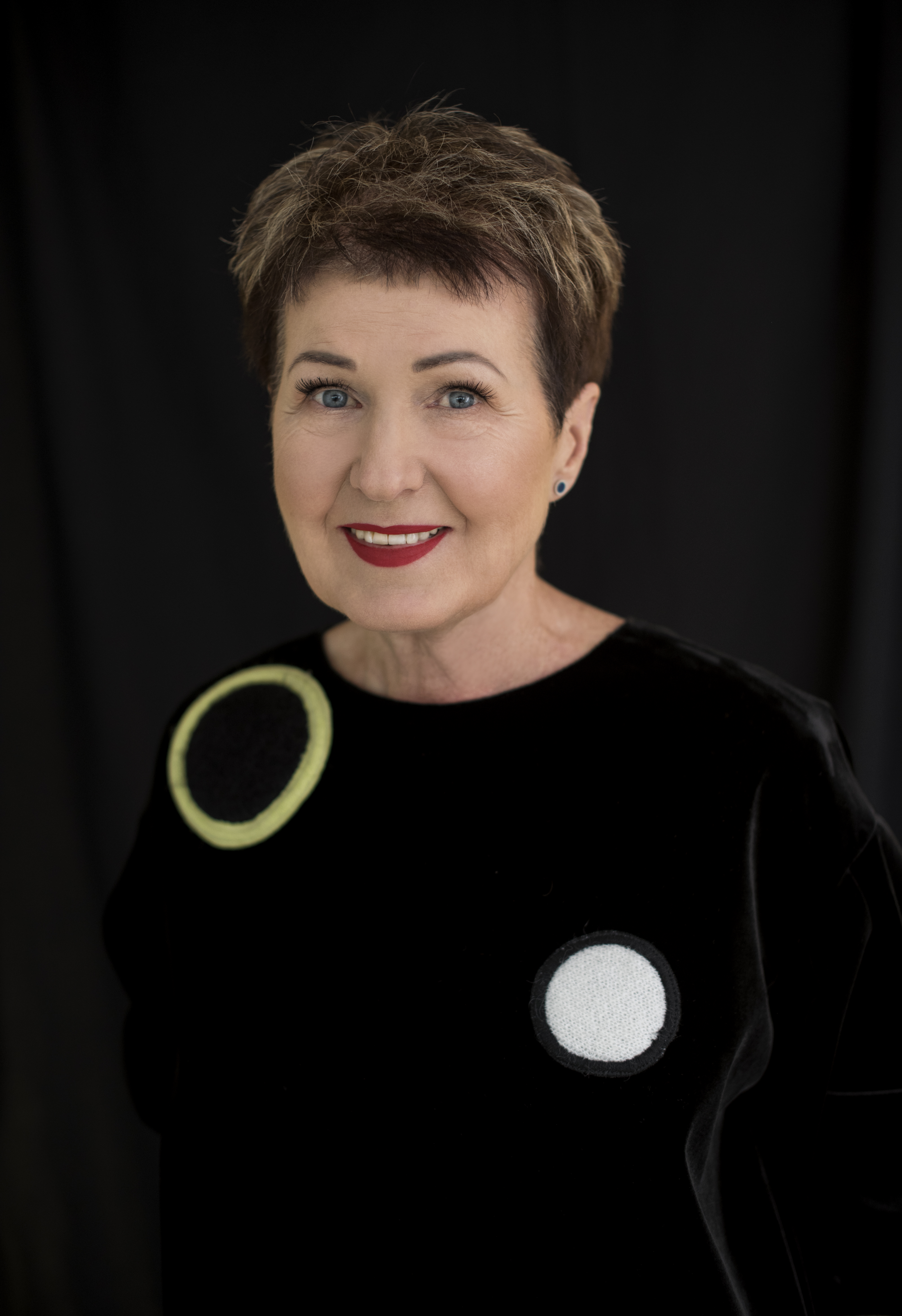 Gražina Arlickaitė